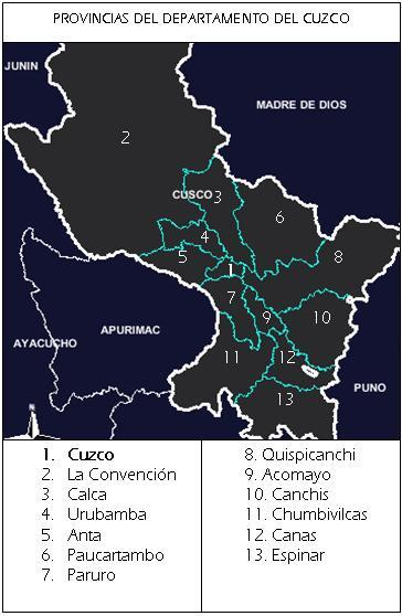 División política de Cuzco. CUZCO IMAG 22